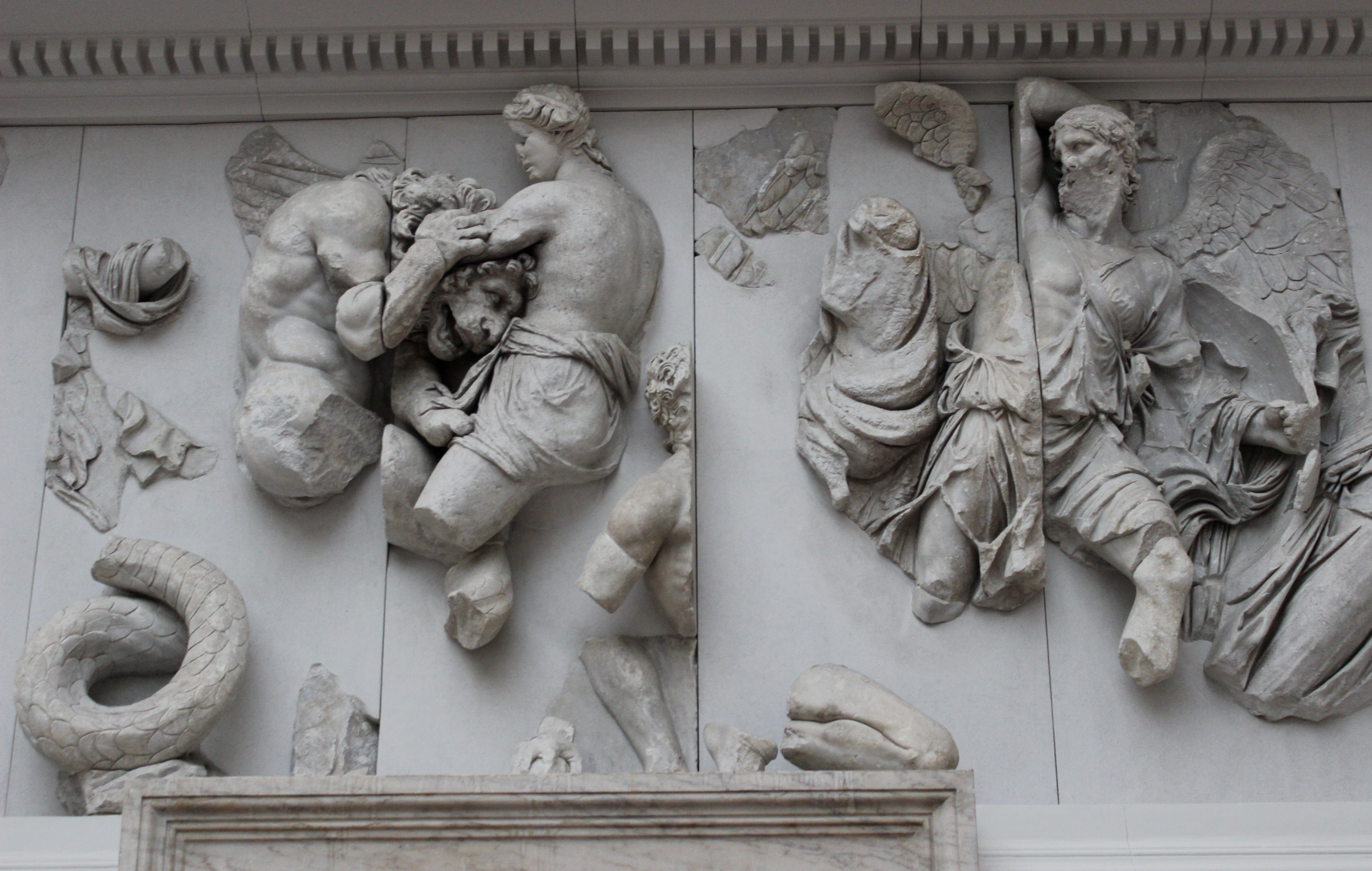 Aither lucha contra los gigantes, altar de Pérgamo.